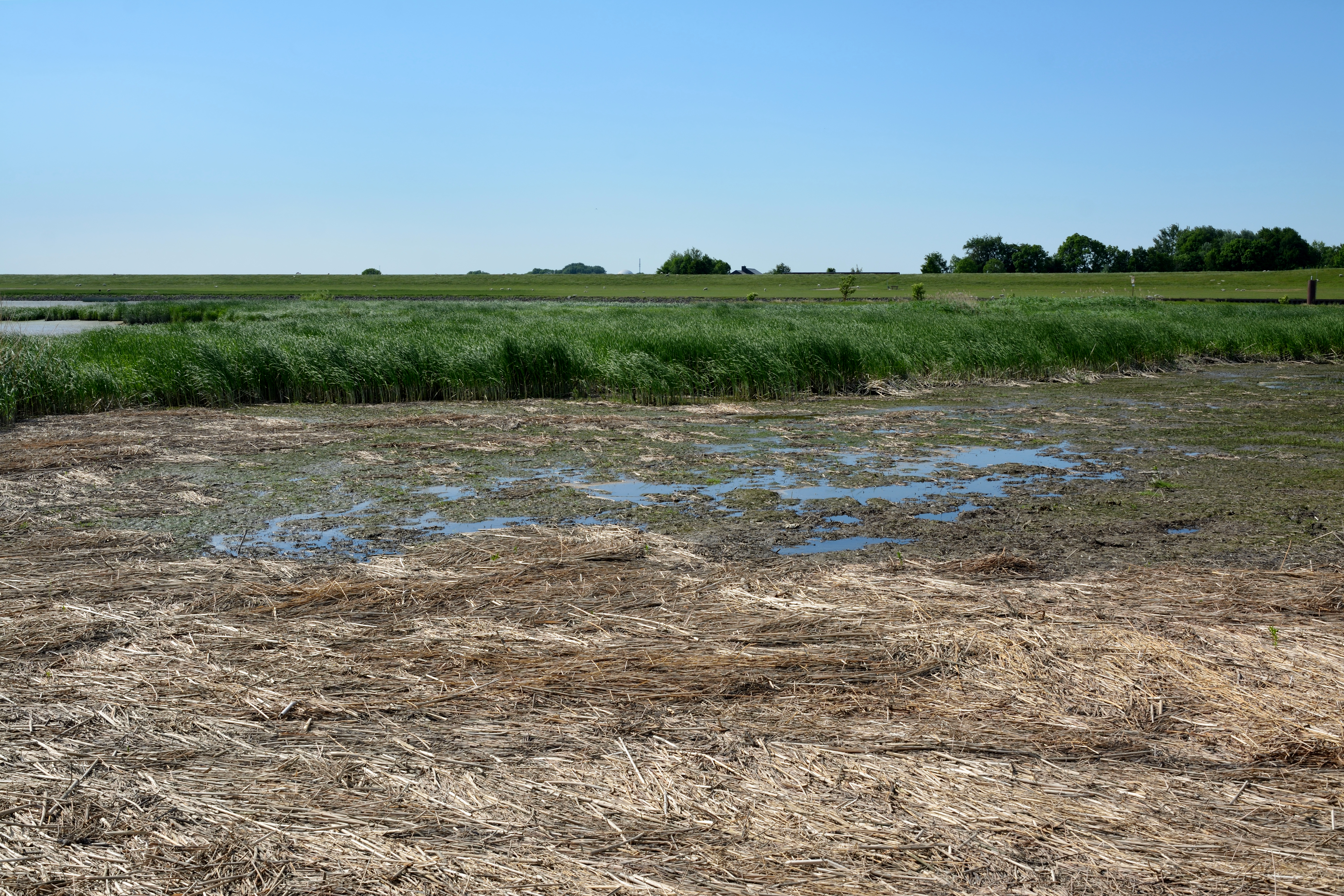 Impressionen aus dem FFH-Gebiet "Schleswig-Holsteinisches Elbästuar und angrenzende Flächen" in Borsfleth, Schleswig-Holstein.